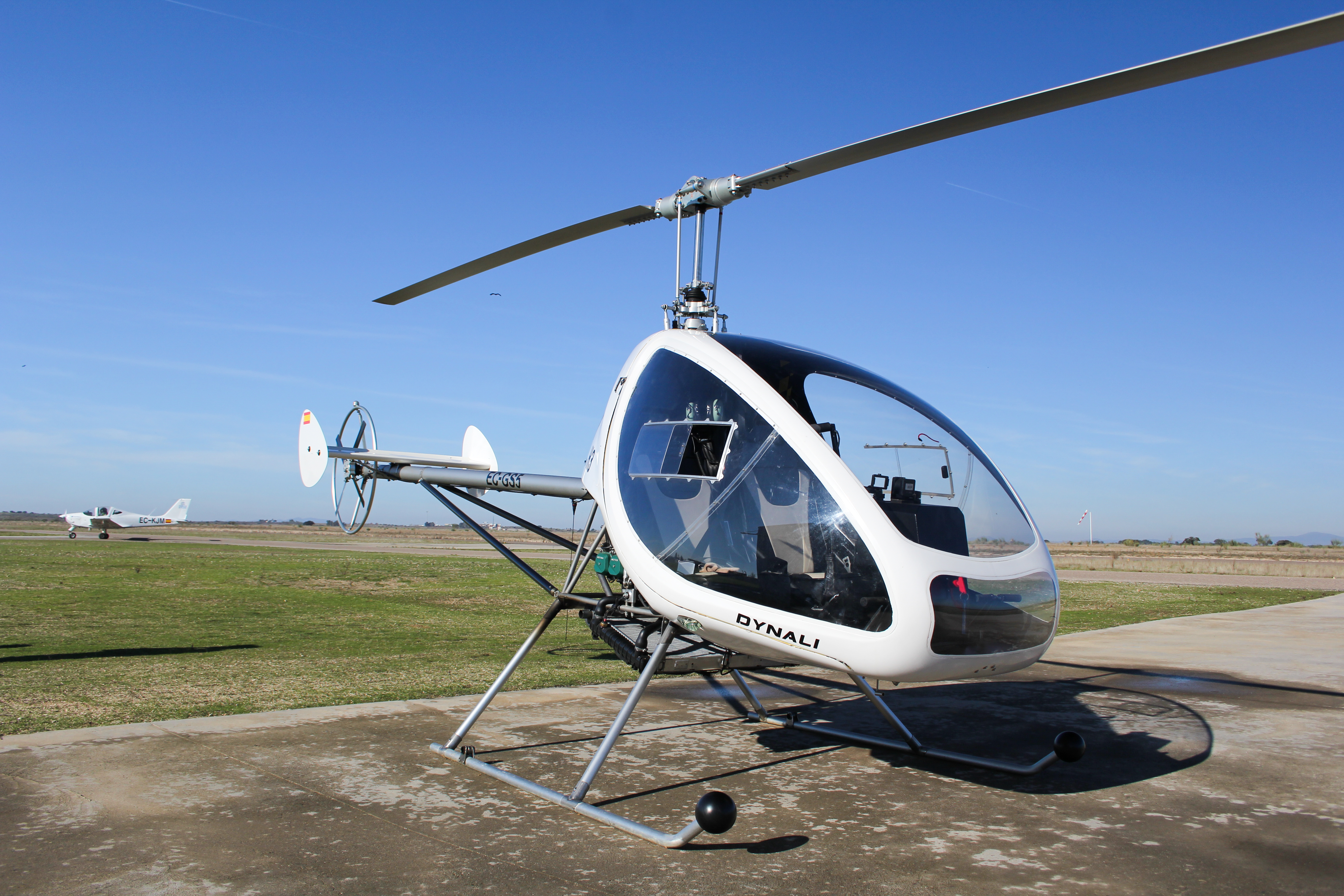 Dynali H3 "Easy Flyer" Sport 110-I operando en Casarrubios del Monte (Toledo)